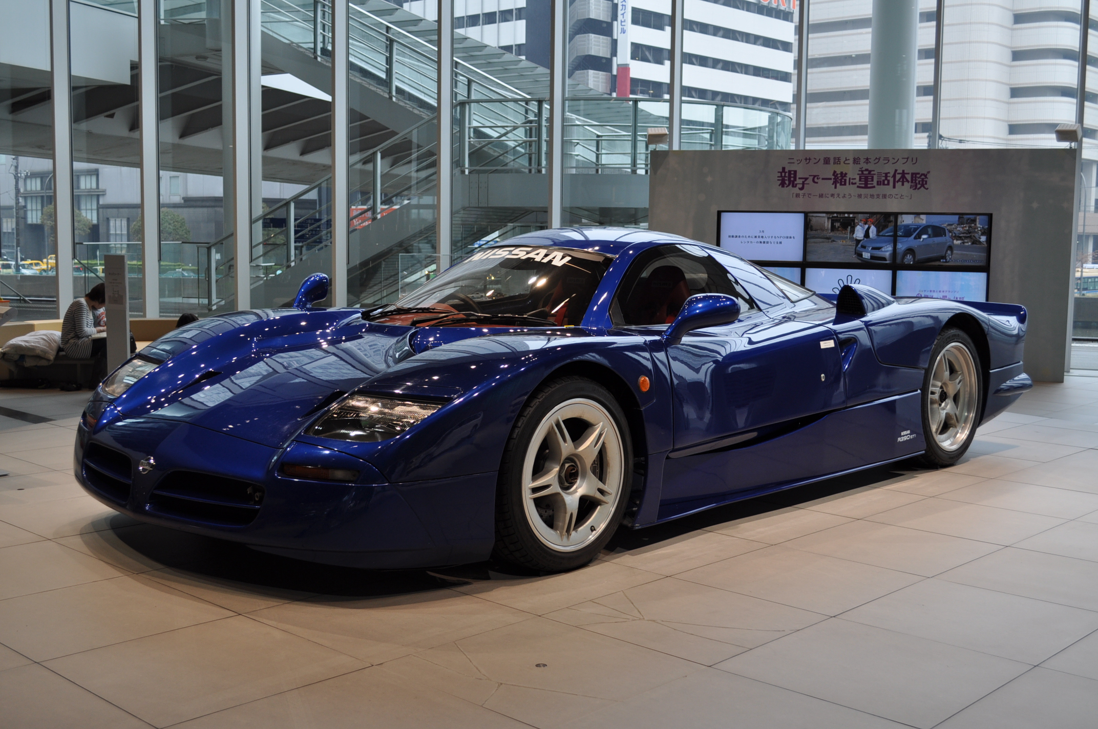 日産R390GT1ロードーカー（日産本社ギャラリーでの展示）